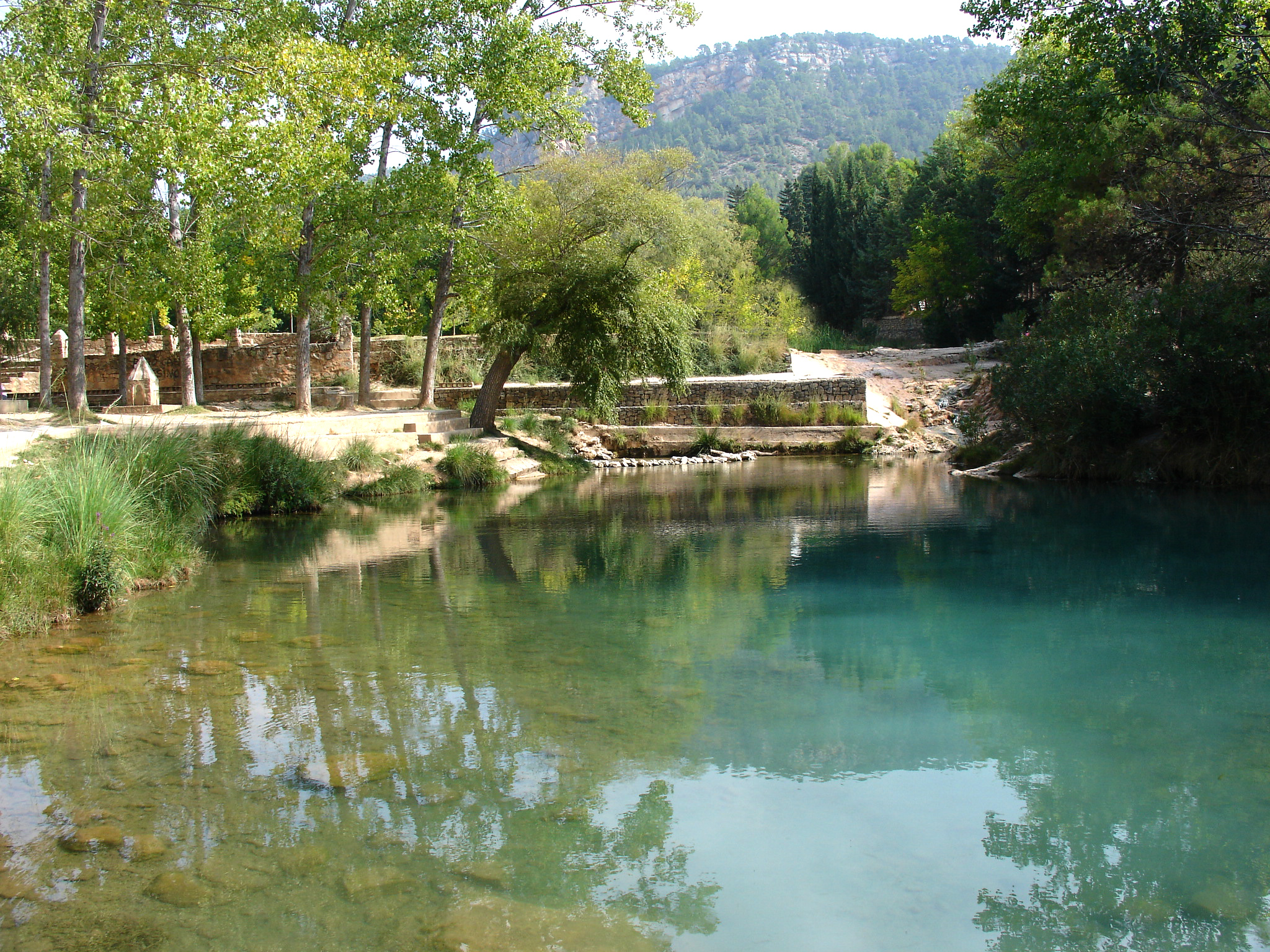 Lago del área recreativa El Azud, en Tuéjar (Valencia, España).